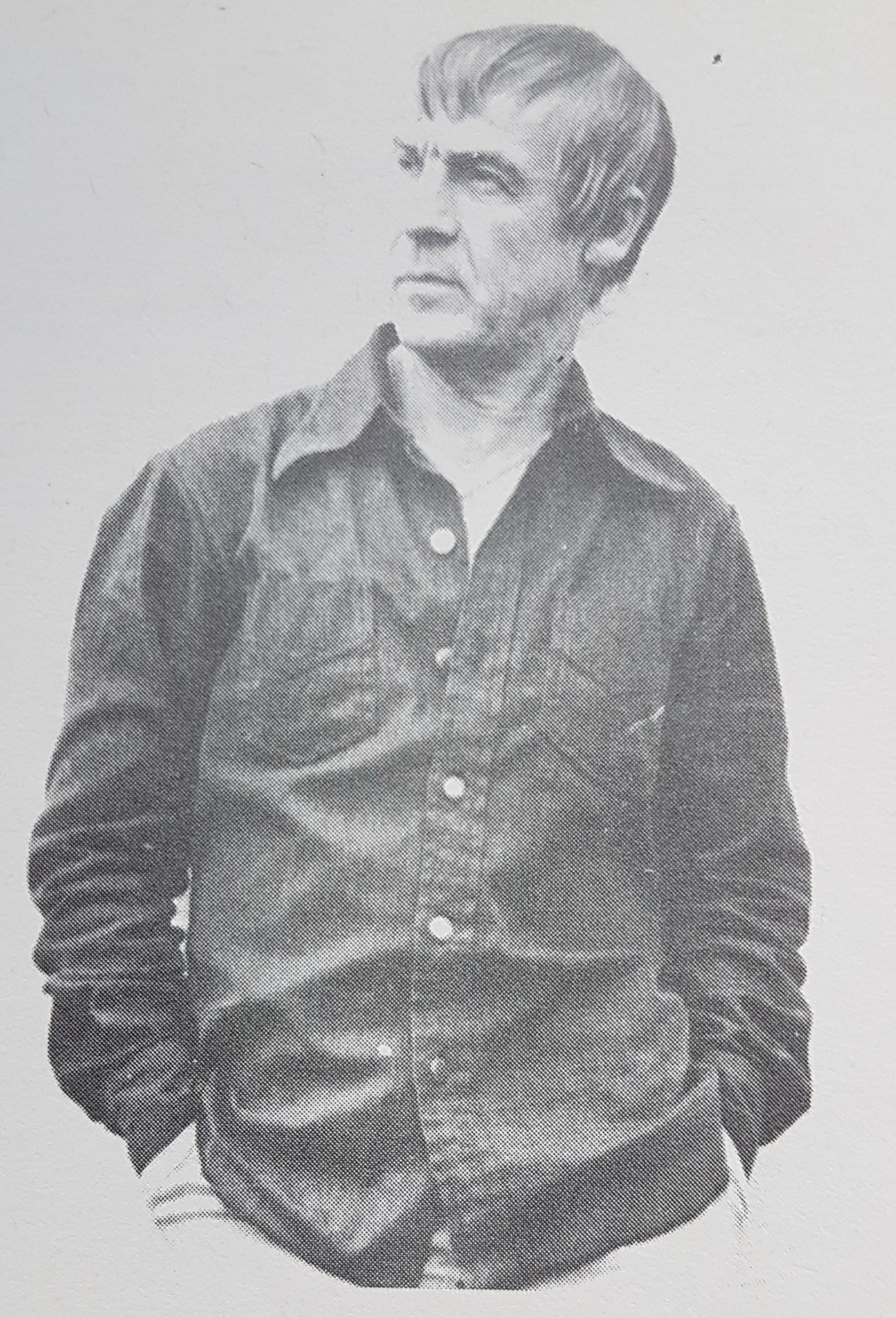 Sven Ekdahl Artist.from Sweden